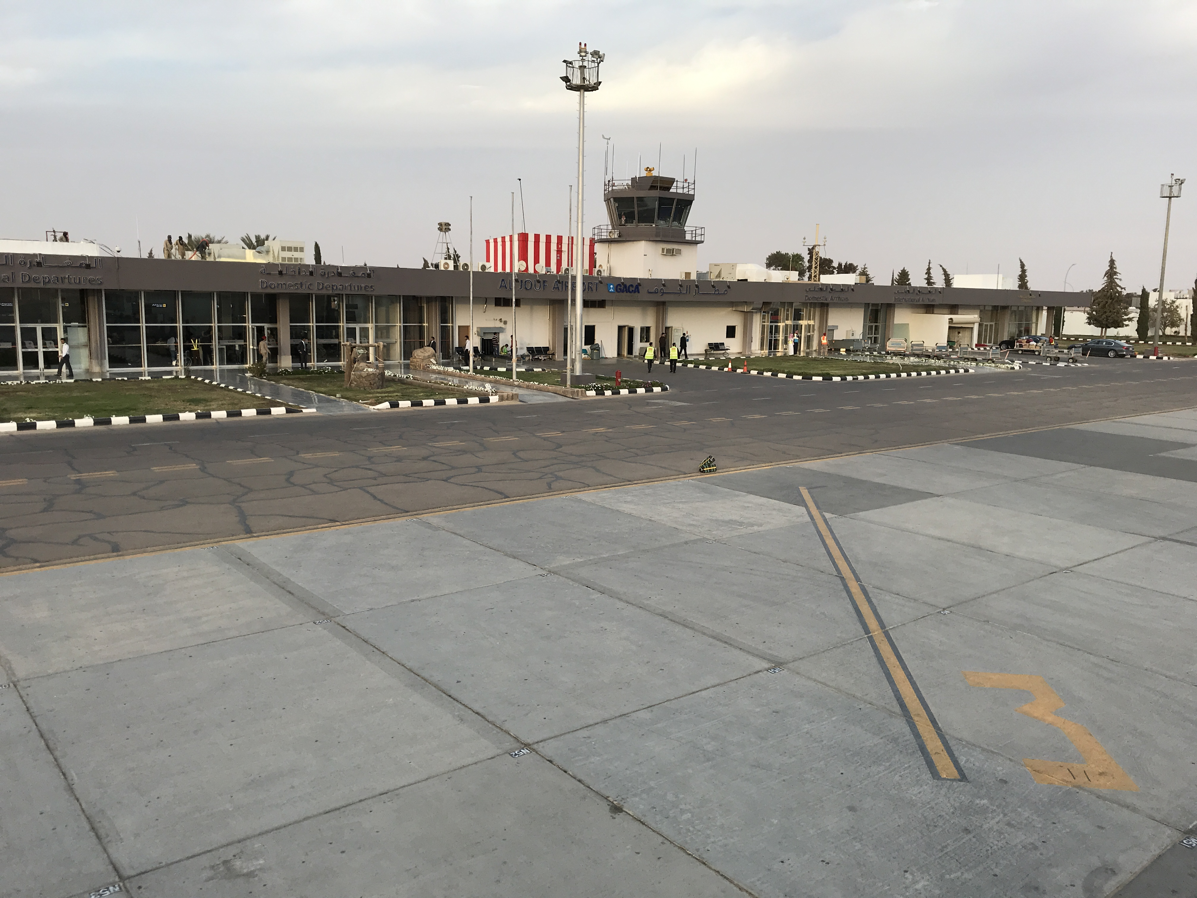 مبنى مطار الجوف